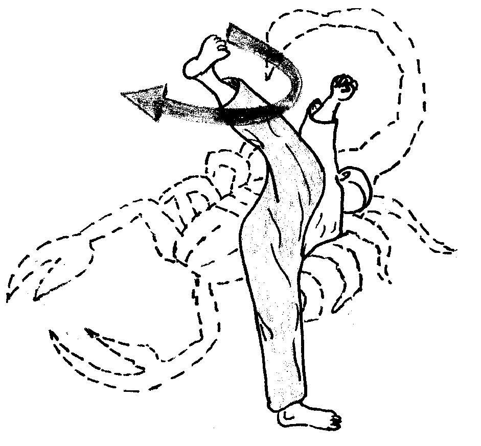 scorpion0